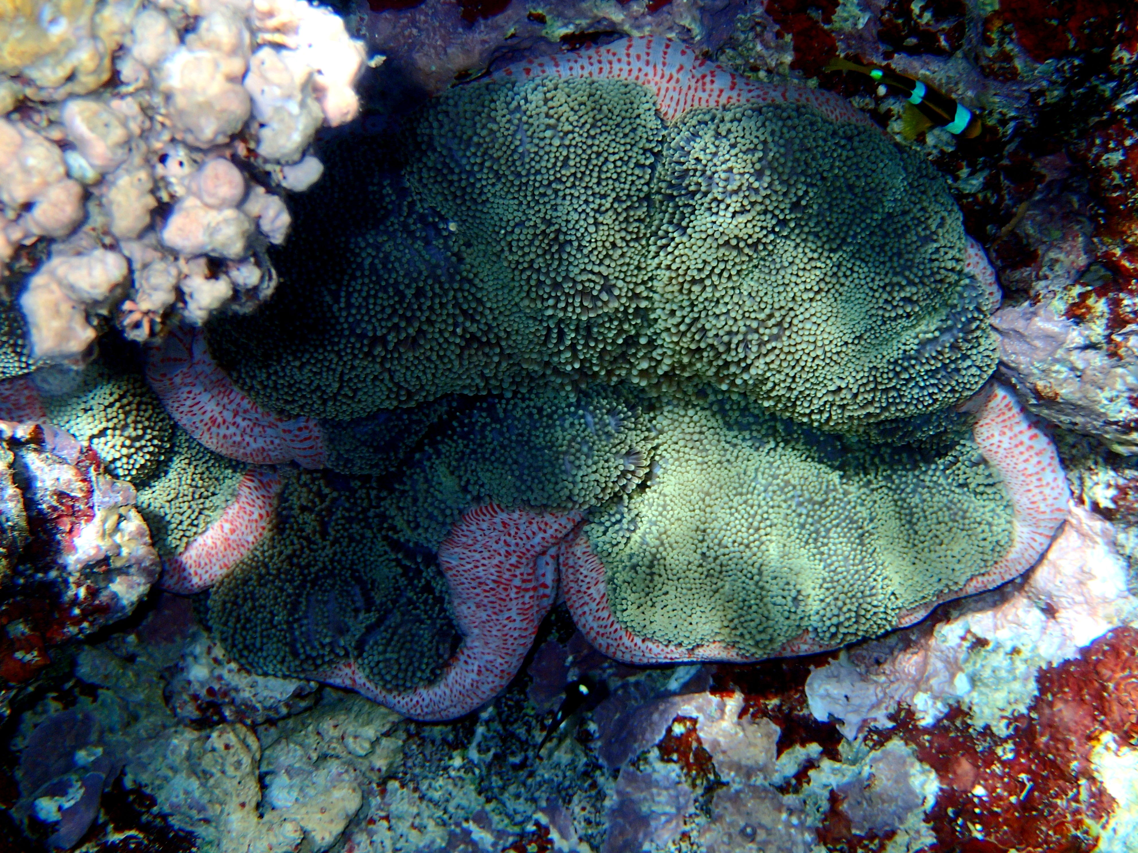 Stichodactyla mertensii, en Vava'eu, Tonga